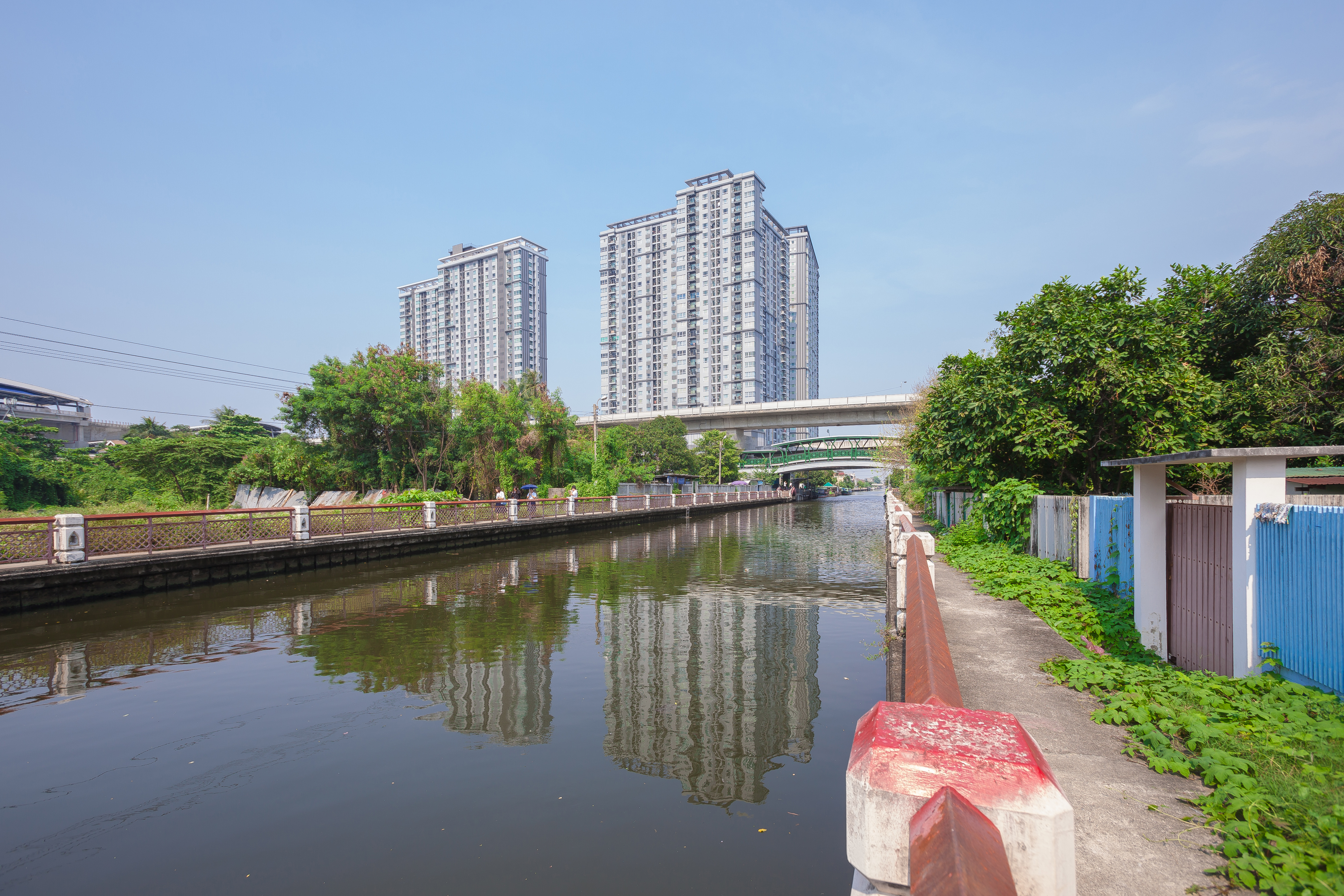 View of Khlong Phasi Charoen near Bang Wa BTS Station.